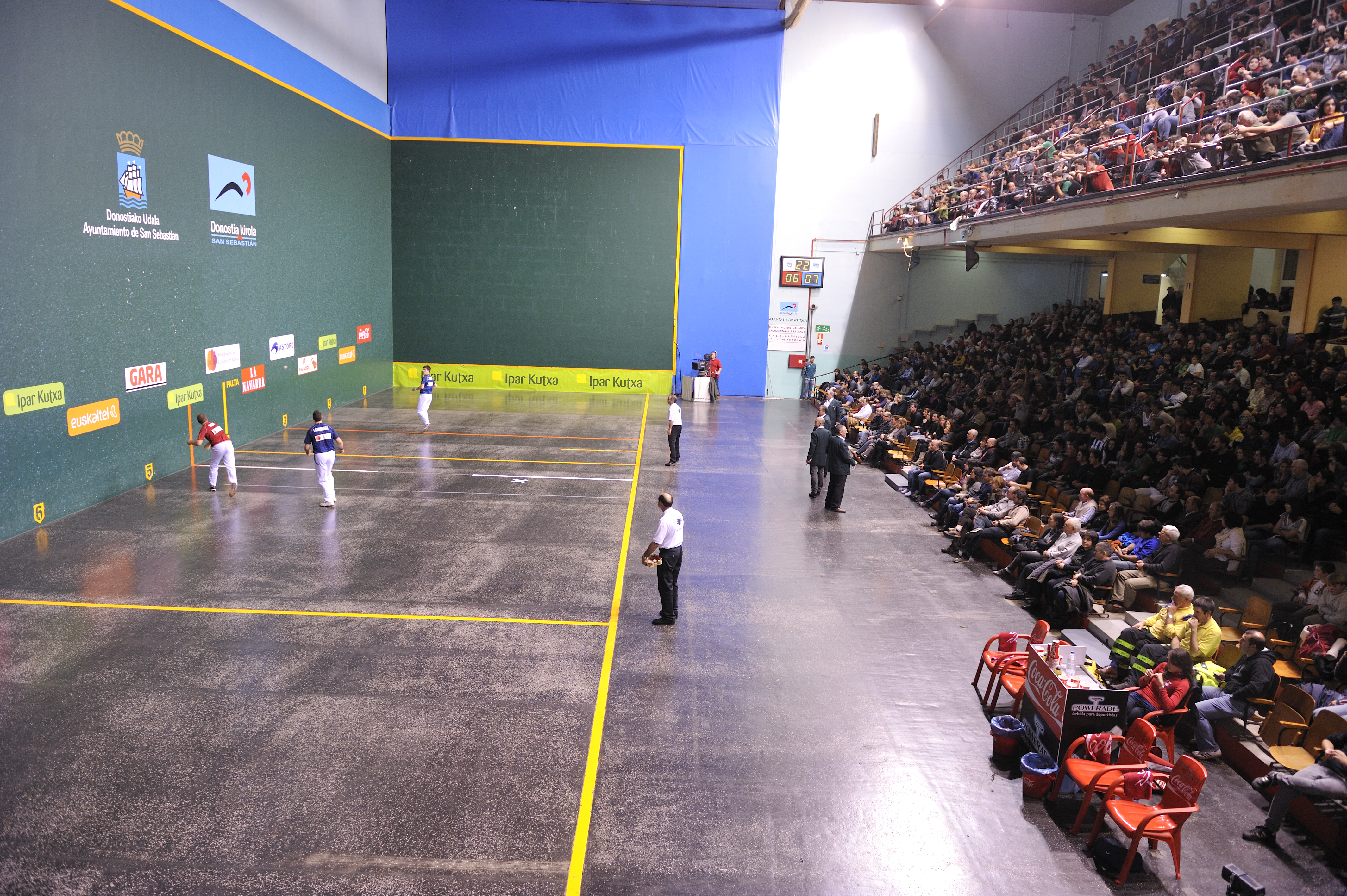 Donostiako Atano III.a pilotalekua